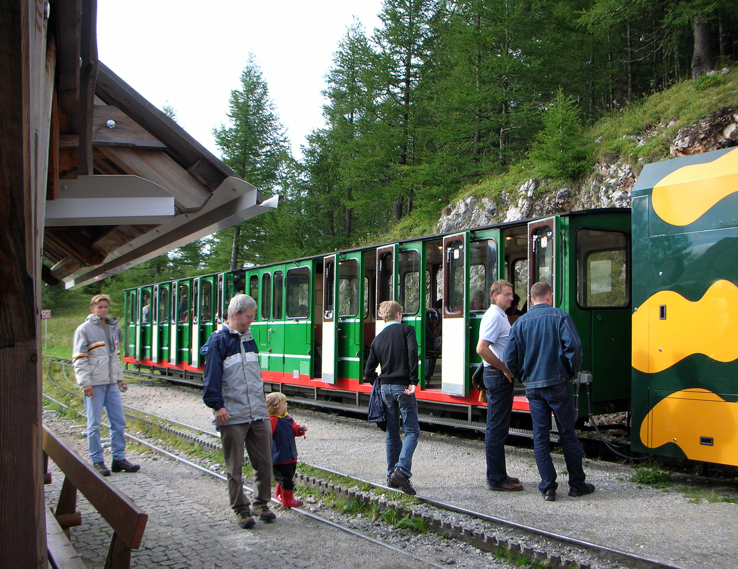 Schneebergbahn (Zahnradbahn), Ganzstahl-Personenwagen, B/SZ, alte Lackierung